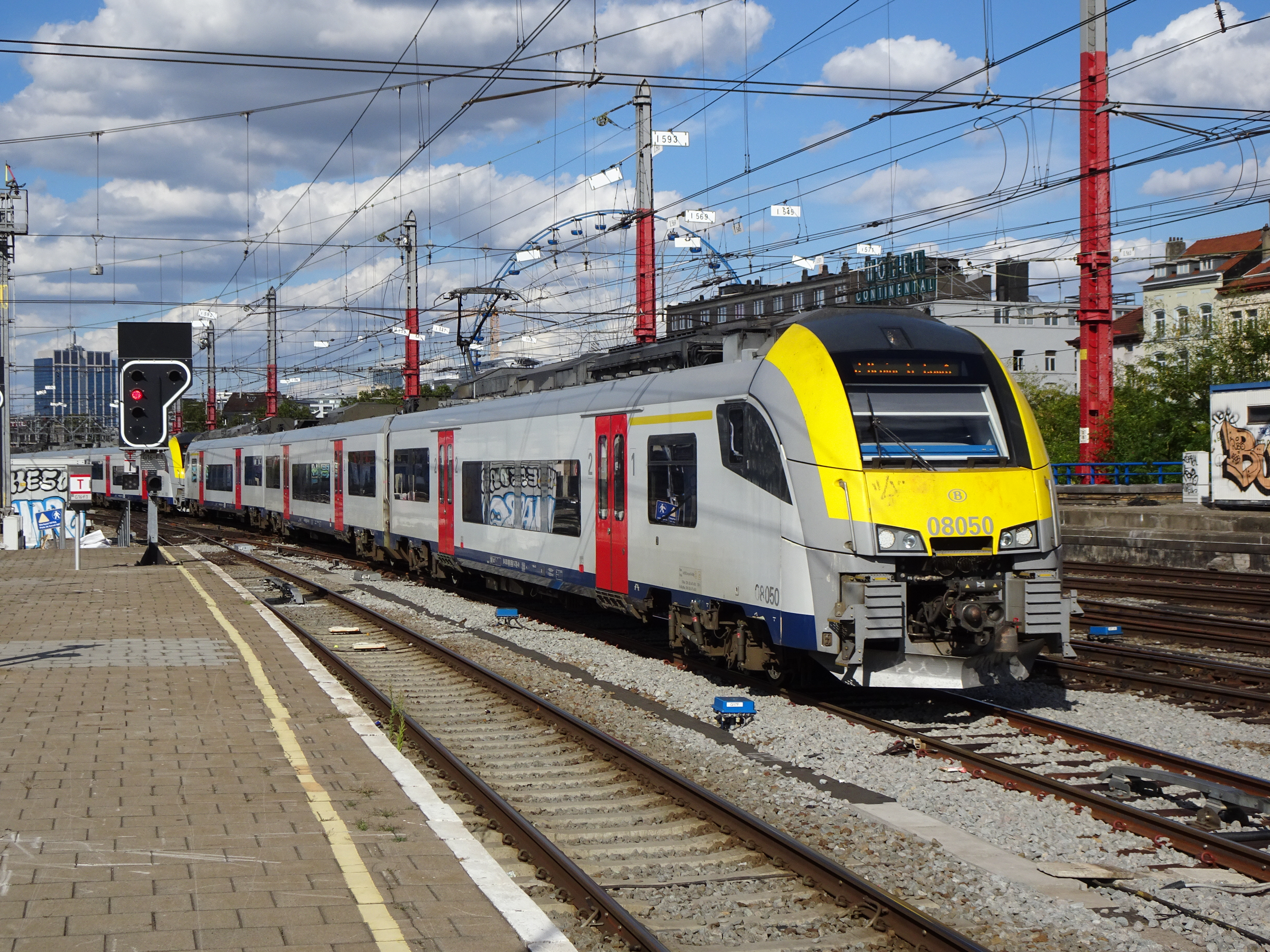 Le train S2 3688 (Louvain - Braine-le-Comte) arrive en gare de Bruxelles-Midi voie 17